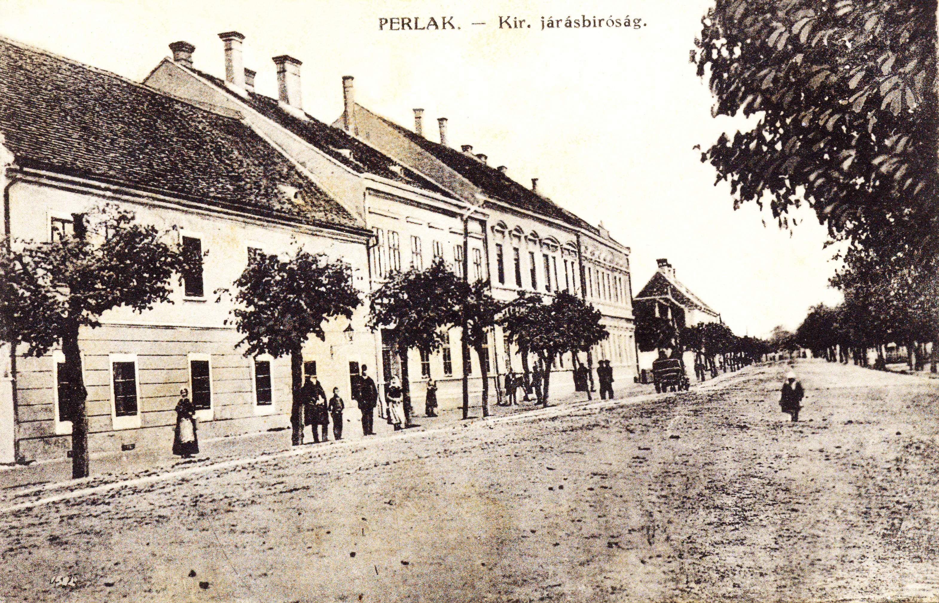 Perlak járásbíróság